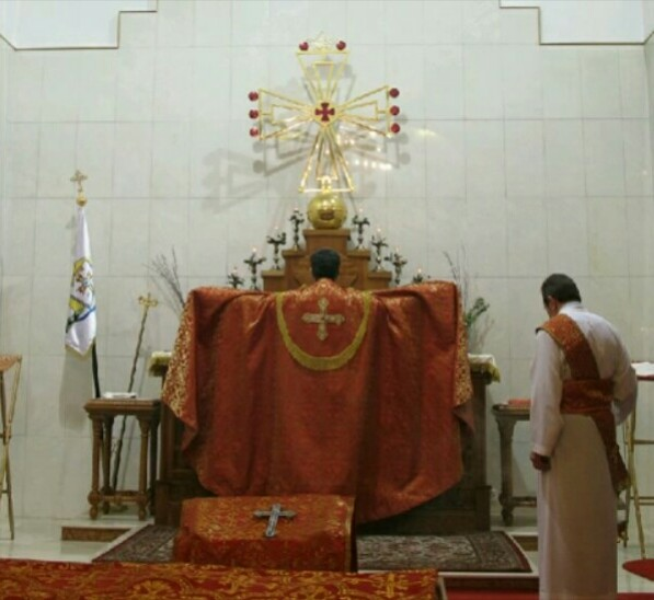 Boska Liturgia w obrządku chaldejskim (Asyryjski Kościół Wschodu)